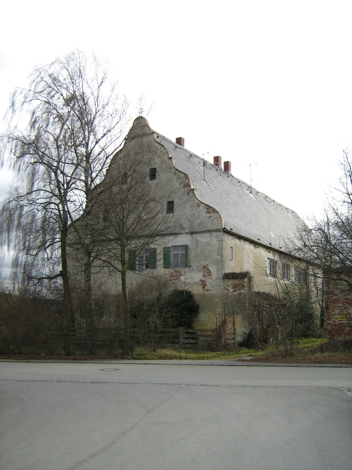 Schlossgut Iglhof (ehem. Schlossgut) in Affing-Iglbach; Ein Wirtschaftsgebäude wurde 2007 abgerissen.